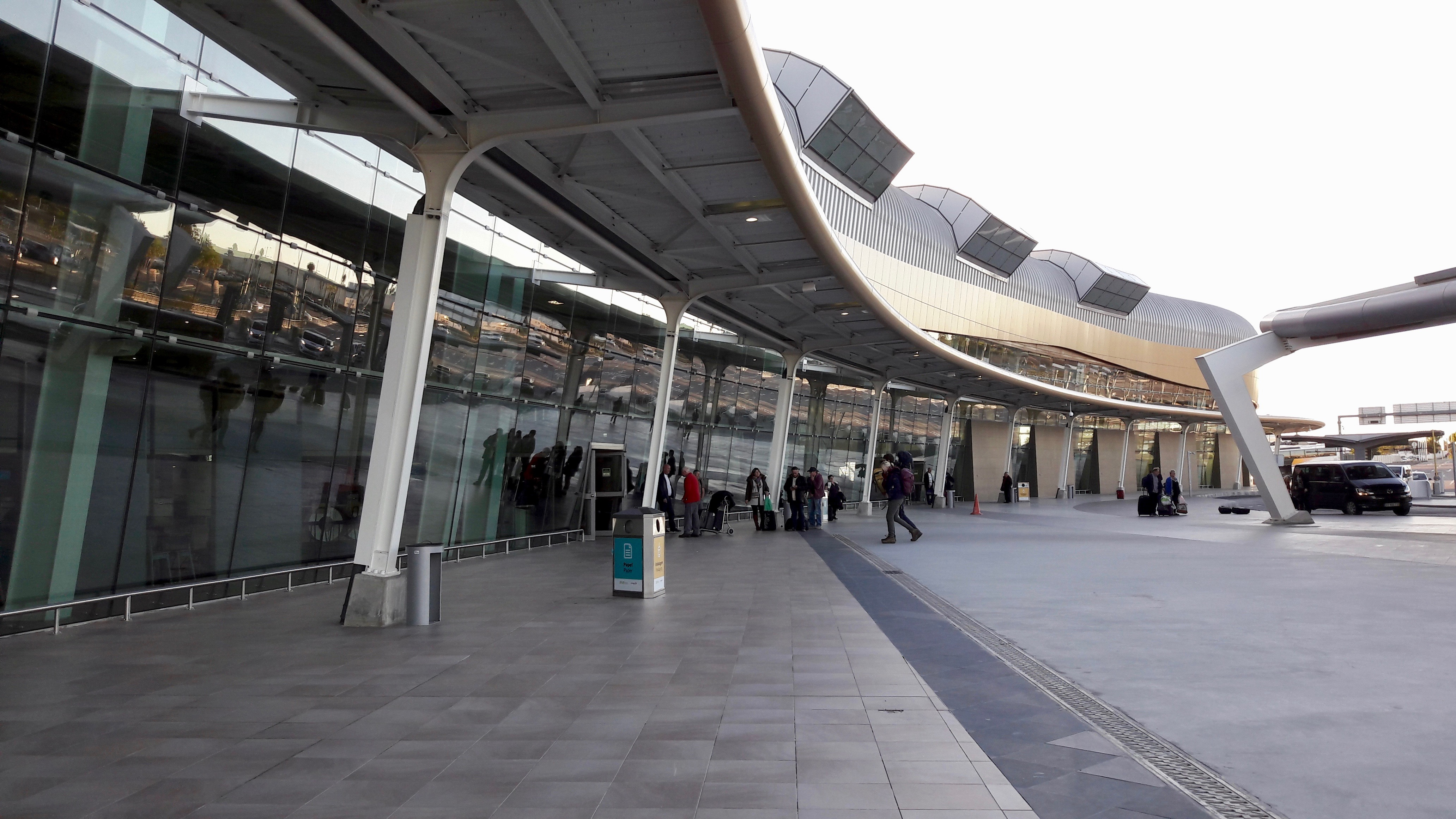 Aeroporto de Faro, Algarve